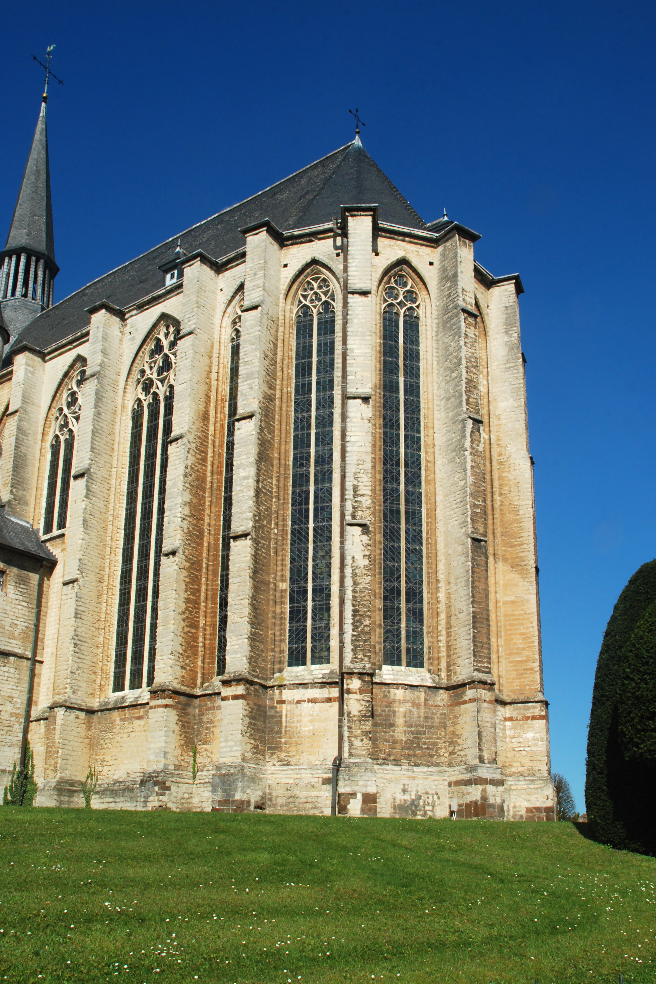 Belgique - Brabant flamand - Louvain - Église Saint-Quentin